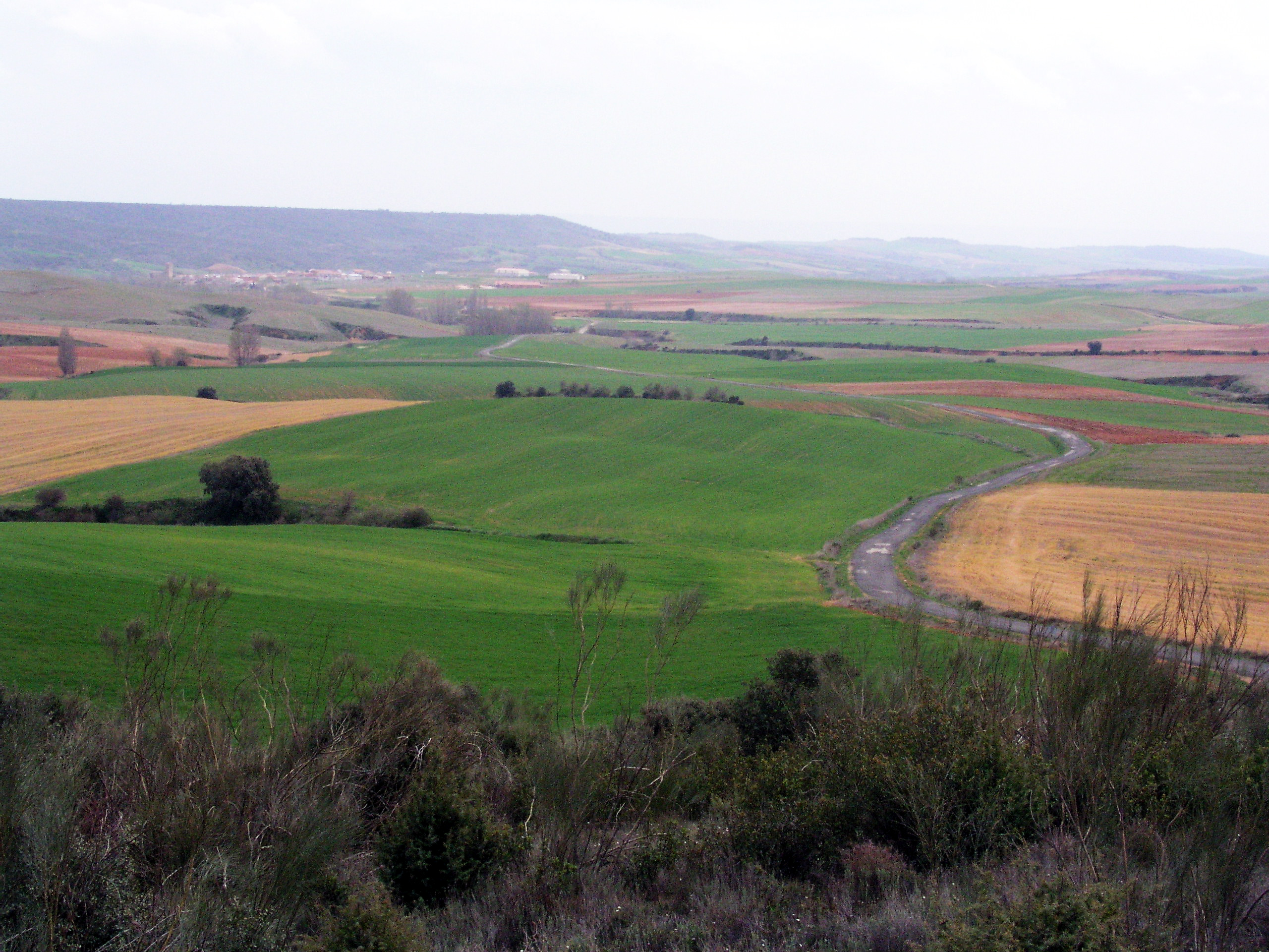 Malaguilla, Provincia de Guadalajara, Castilla-La Mancha, Spain. Countryside view. The photo was taken the 8th of April 2004 by Håkan Svensson (Xauxa).